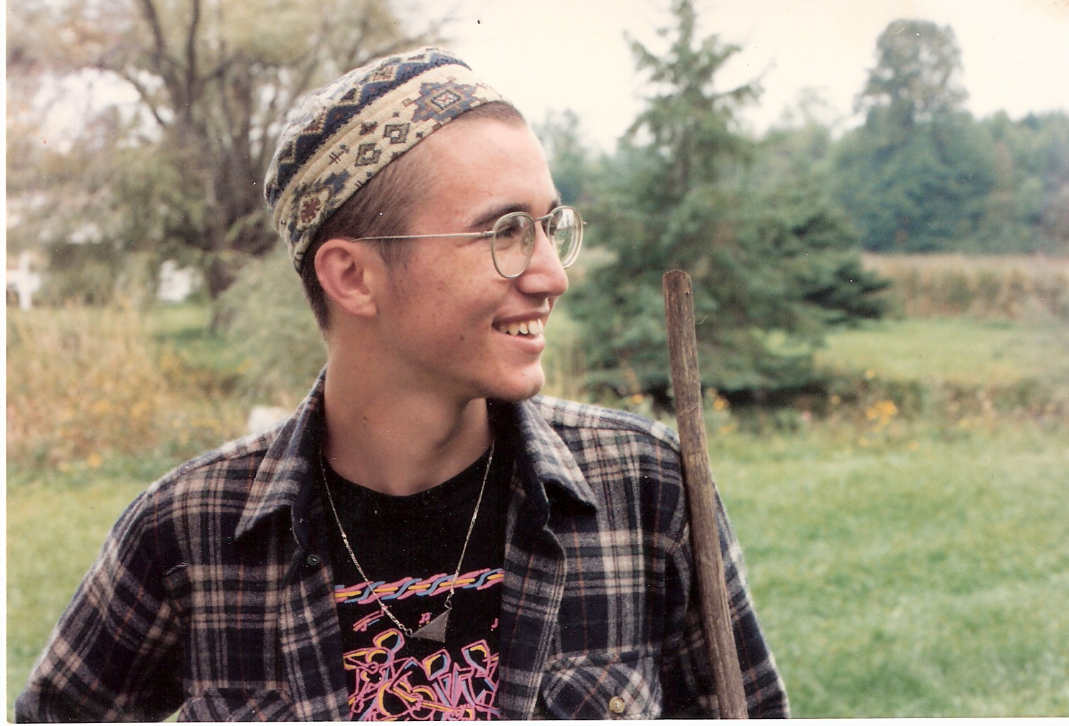 Man wearing a kufi